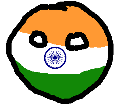 Indiaball